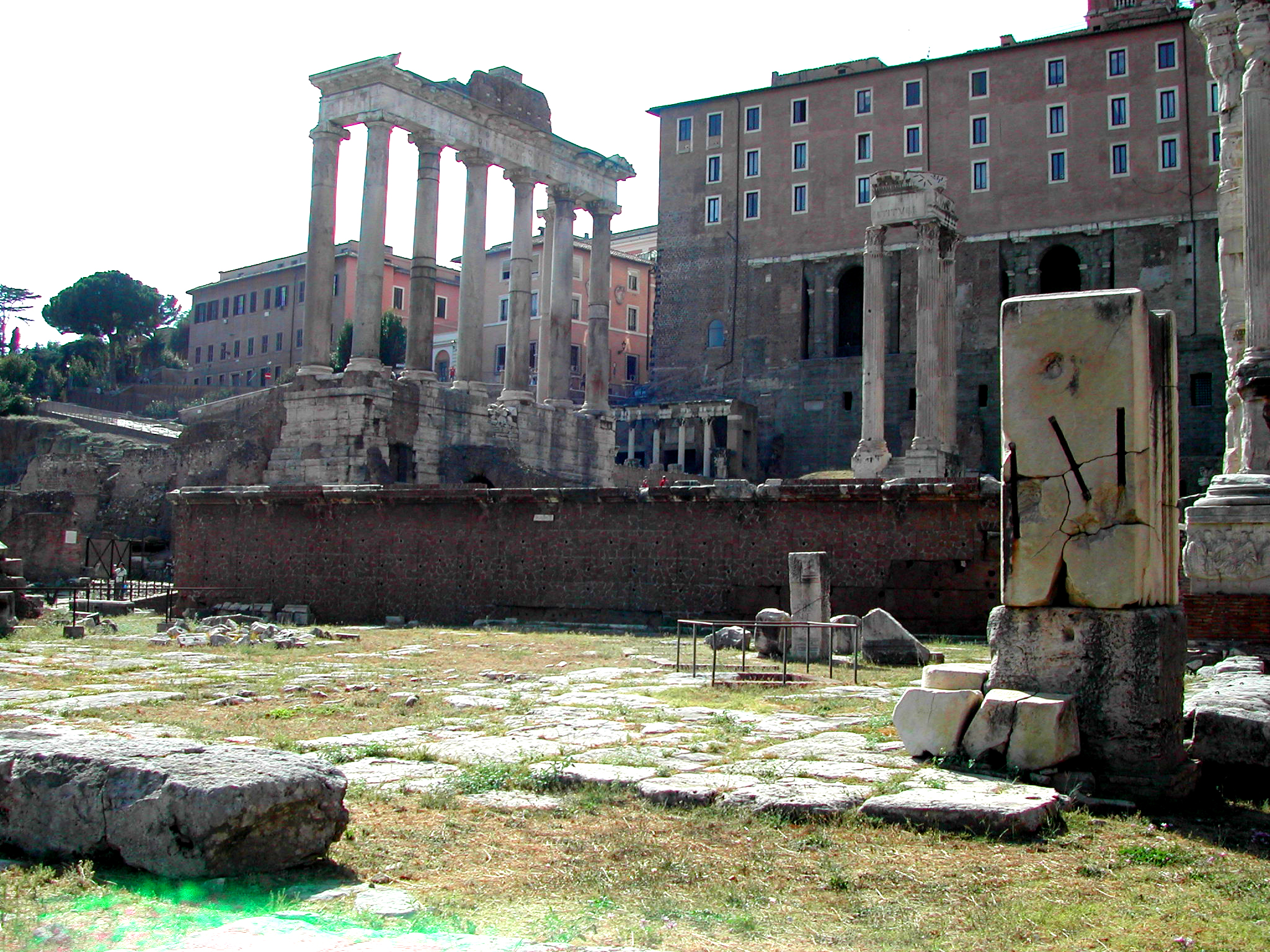 Imagen de los rostra, ubicados dentro del foro romano.